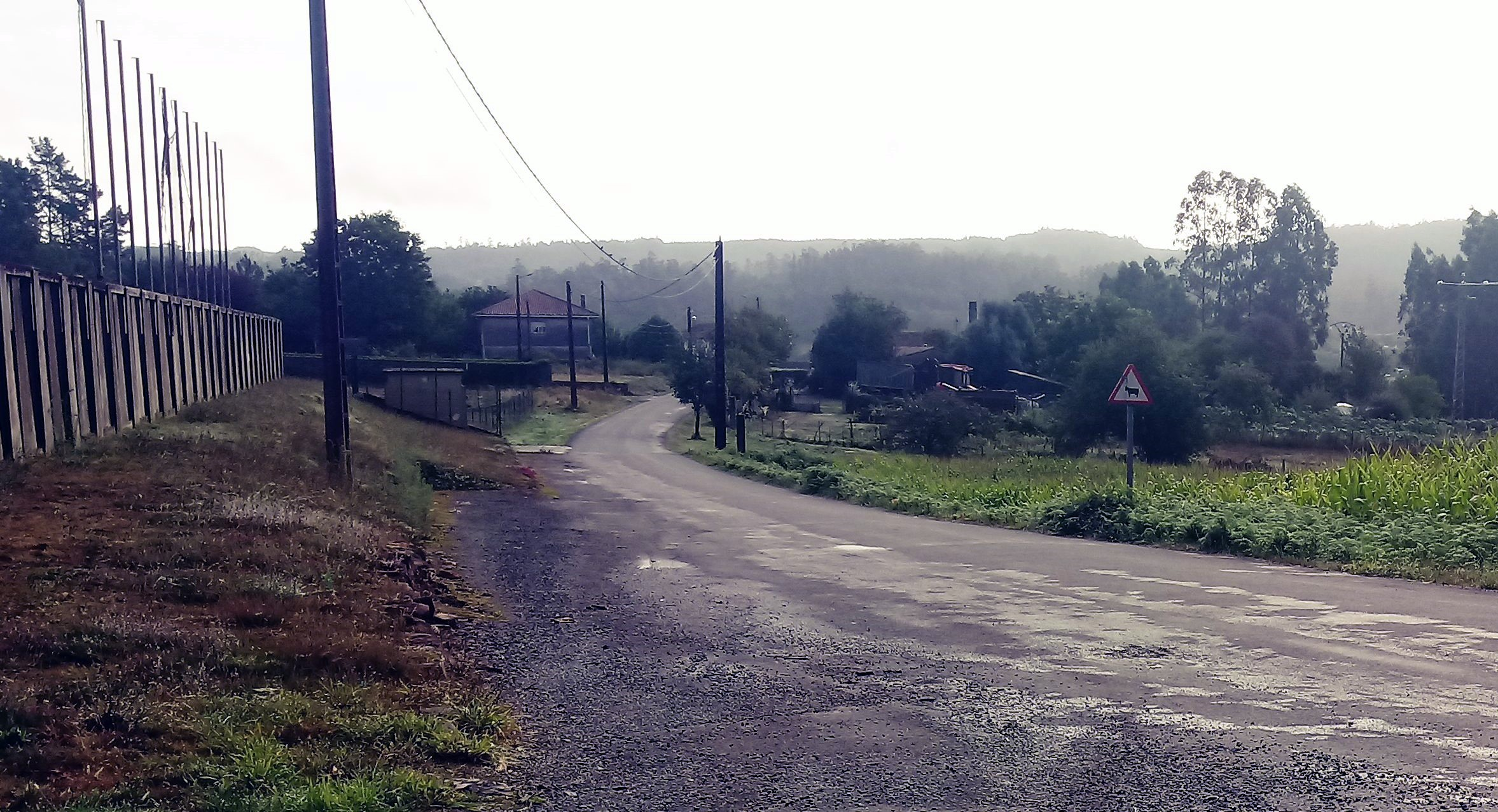 Casarío do Lameiro, fotografía tomada desde o Campo de Fútbol de Lameiro.